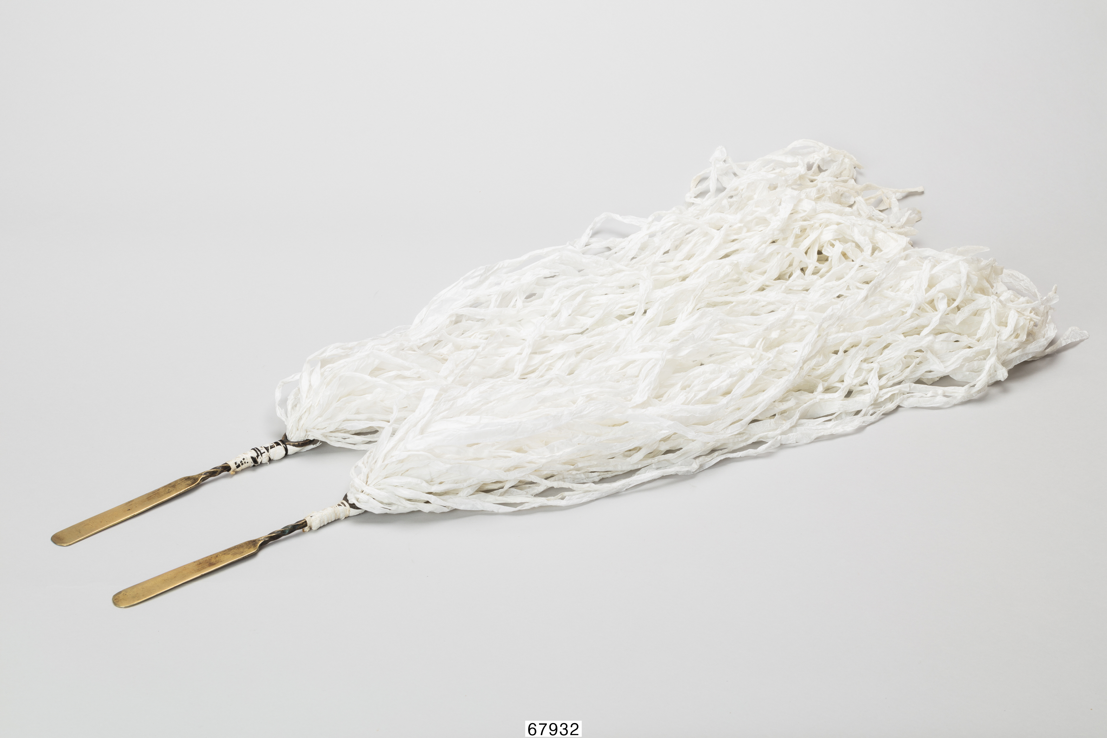 동해안 별신굿에서 악귀 및 부정(不淨)을 내쫓기 위해 사용한다.